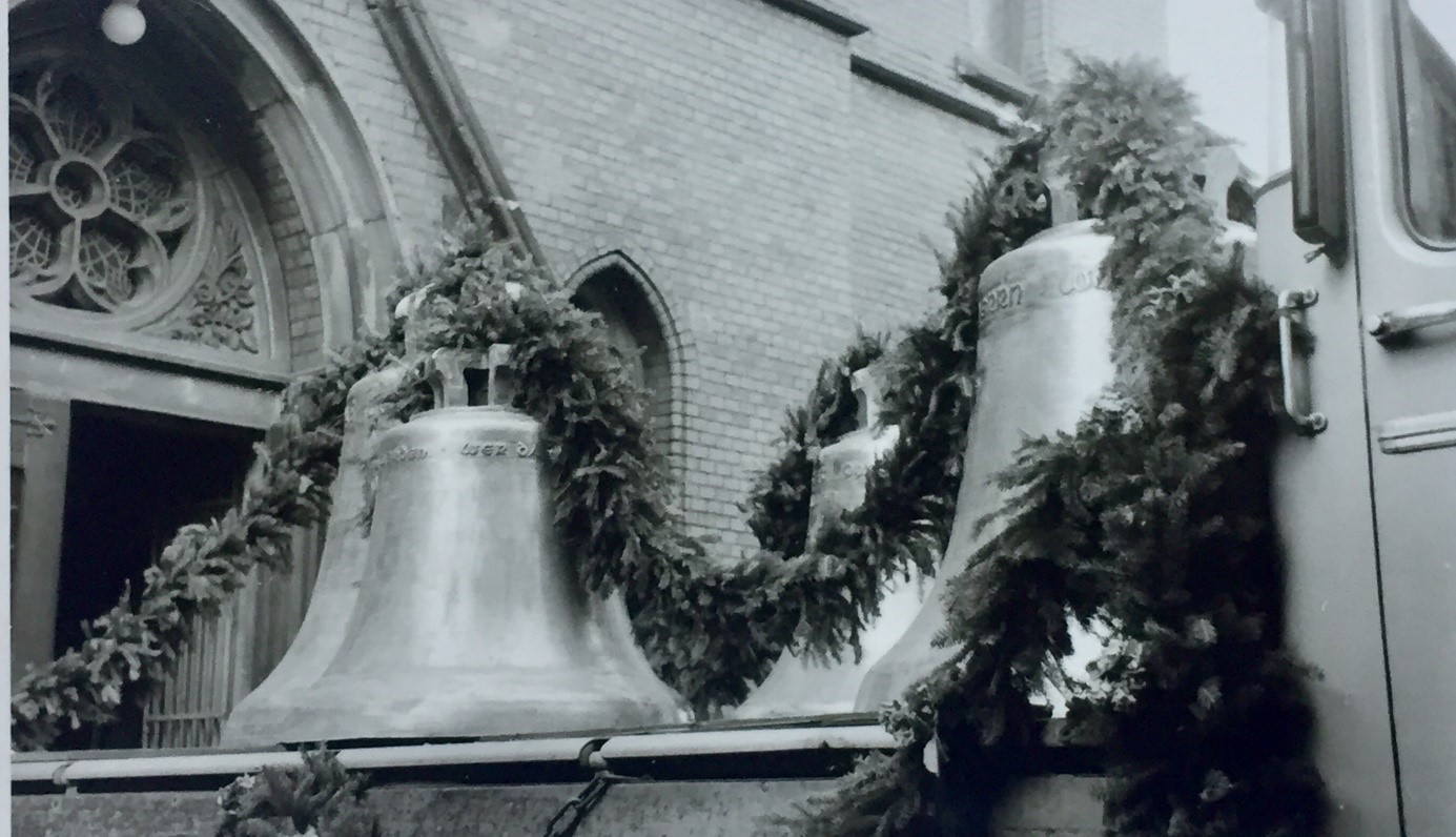 Neue Glocken der Christuskirche vor dem Hauptportal 1958. Archiv der Kirchengemeinde